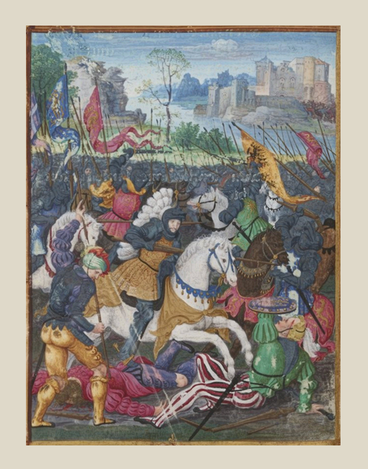 Noël Bellemare (Attribué à).- François Ier chargeant contre les mercenaires Suisses à la bataille de Marignan, 13-14 septembre 1515 in Les Oraisons de Cicéron, traduction par Étienne Le Blanc, vers 1529-1530.